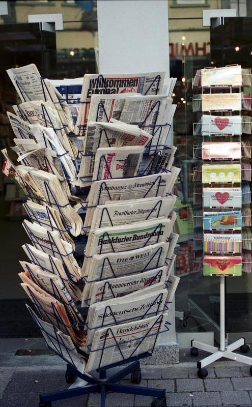 Juni 1988 Göttingen- Fußgängerzone